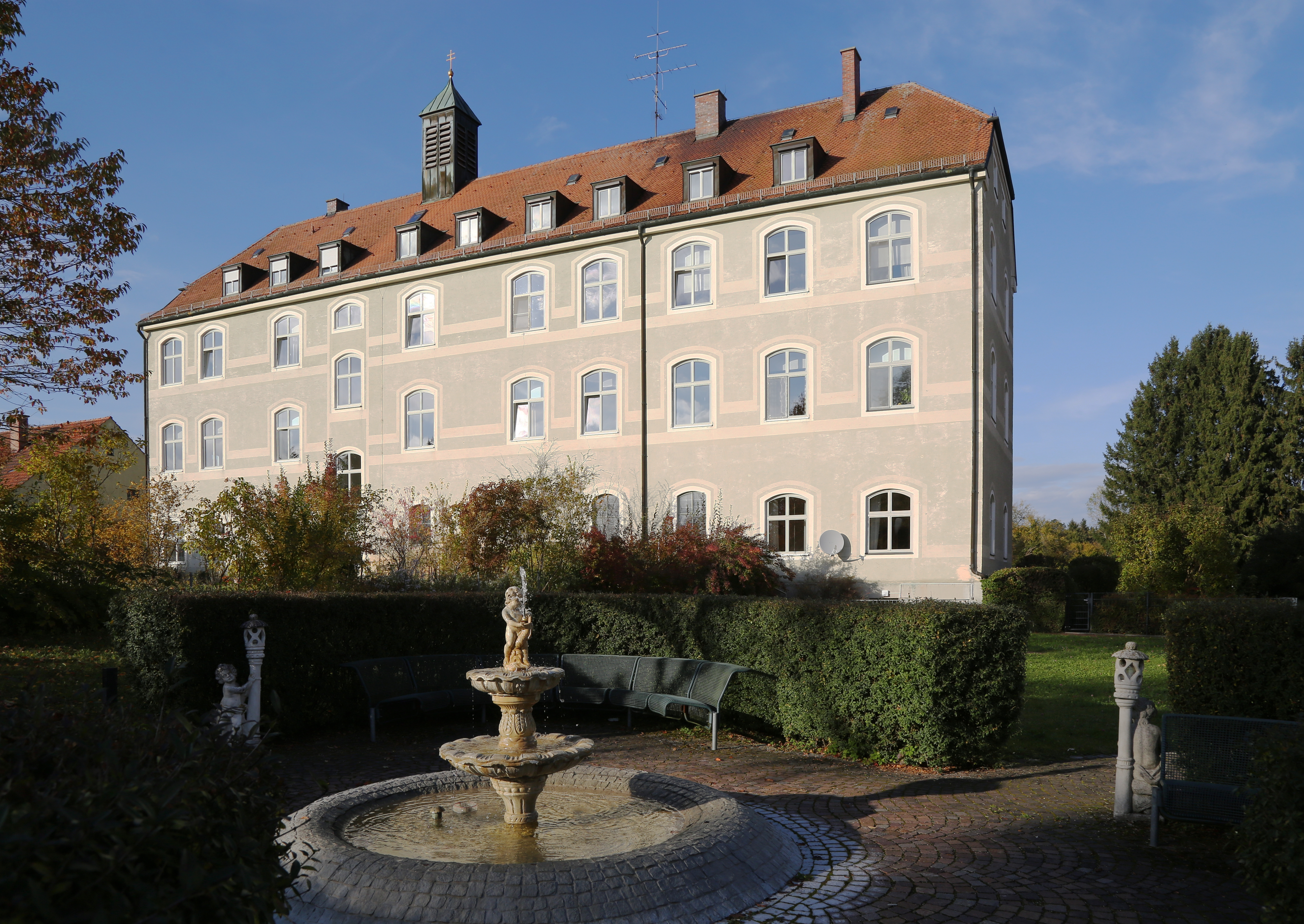 Gut Warnberg in München-Solln. Auf den Gelände eines historischen Gutes befinden sich die Marienanstalt Warnberg, die Privatschule Gut Warnberg, ein Reitstall und weitere Gebäude. Das Haupthaus der Marienanstalt, ehem. Schloss bzw. Herrenhaus, dreigeschossiger Schopfwalmdachbau, im Kern 1667, 1886 verändert und 1927/28 nach Osten erweitert; darin Kath. Kapelle St. Ignatius; mit Ausstattung. Blick von Südost.